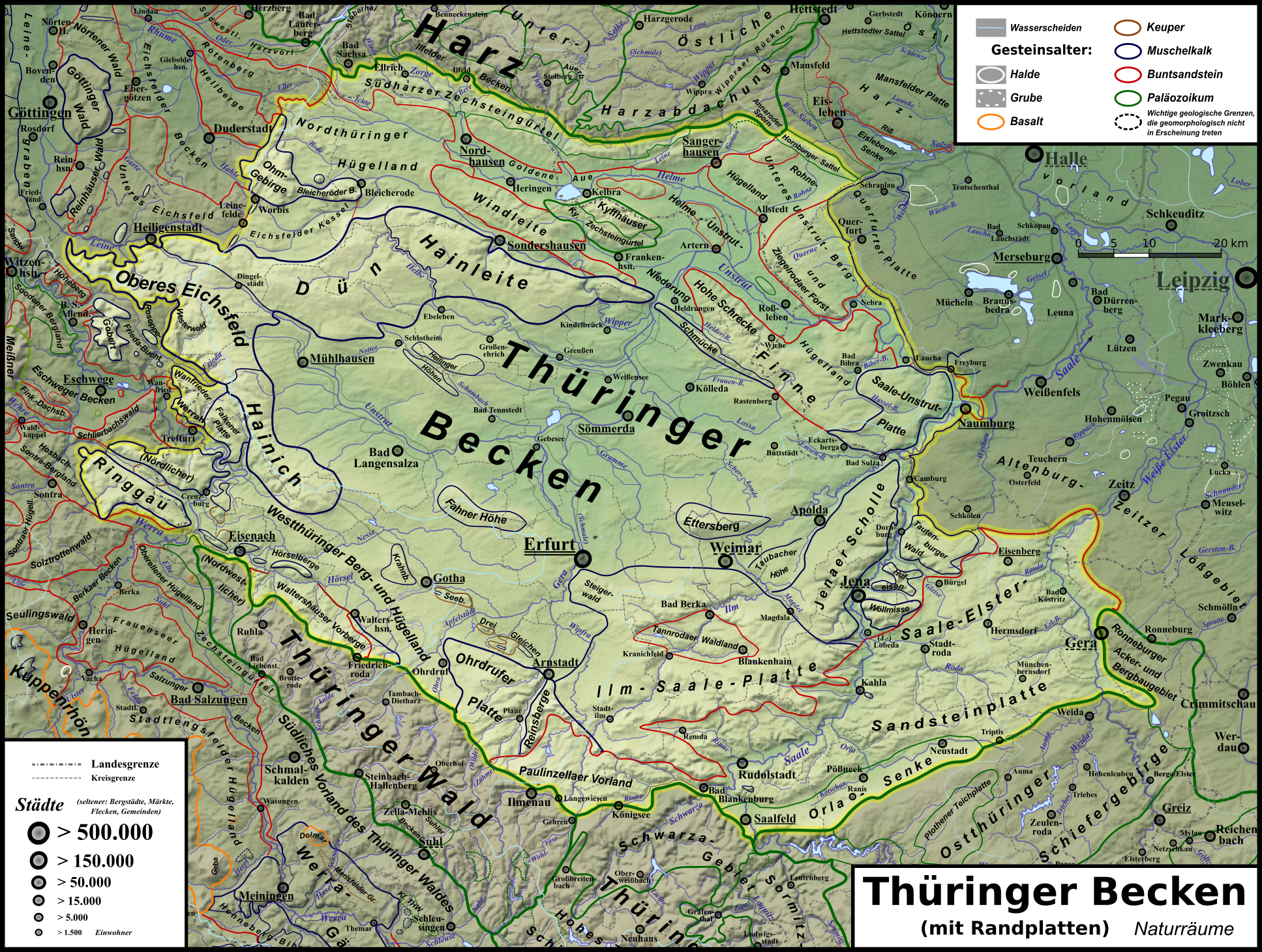 Naturraumkarte des Thüringer Beckens; hervorgehoben sind auch externe Muschelkalk-Zeugenberge.